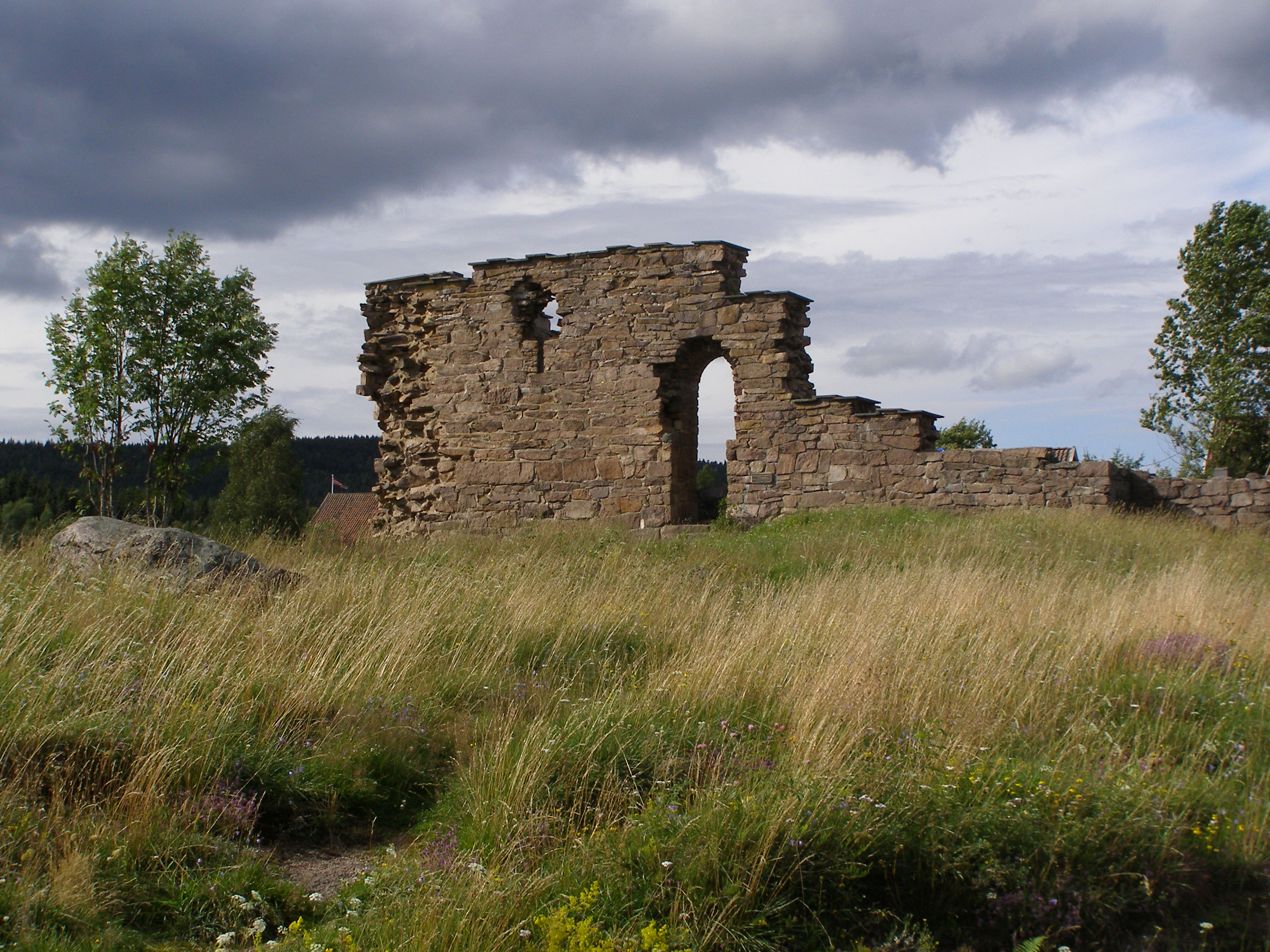 Margarethakirken